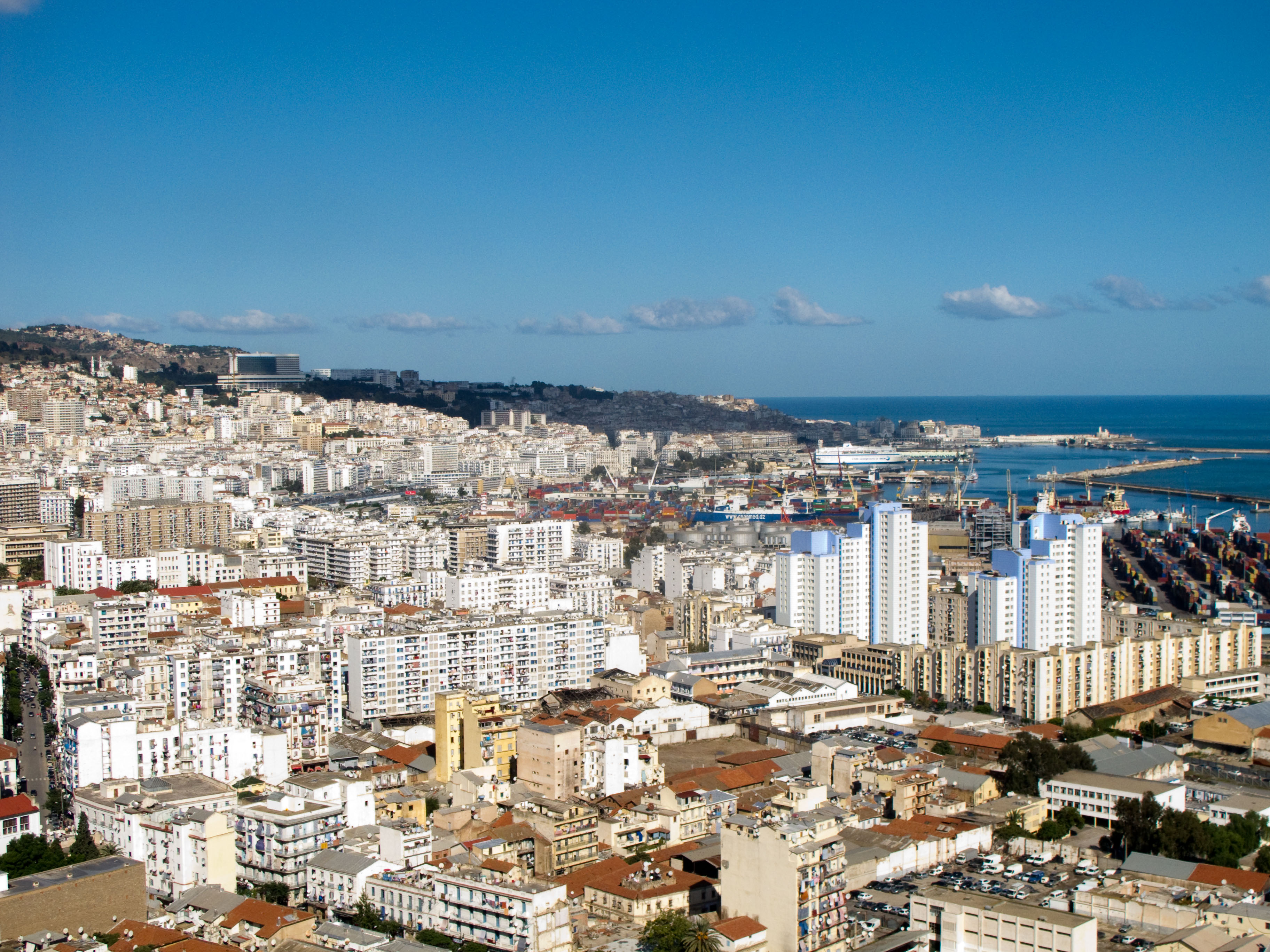 Vue d'Alger depuis la cité Diar El Mahçoul. Alger, Algérie